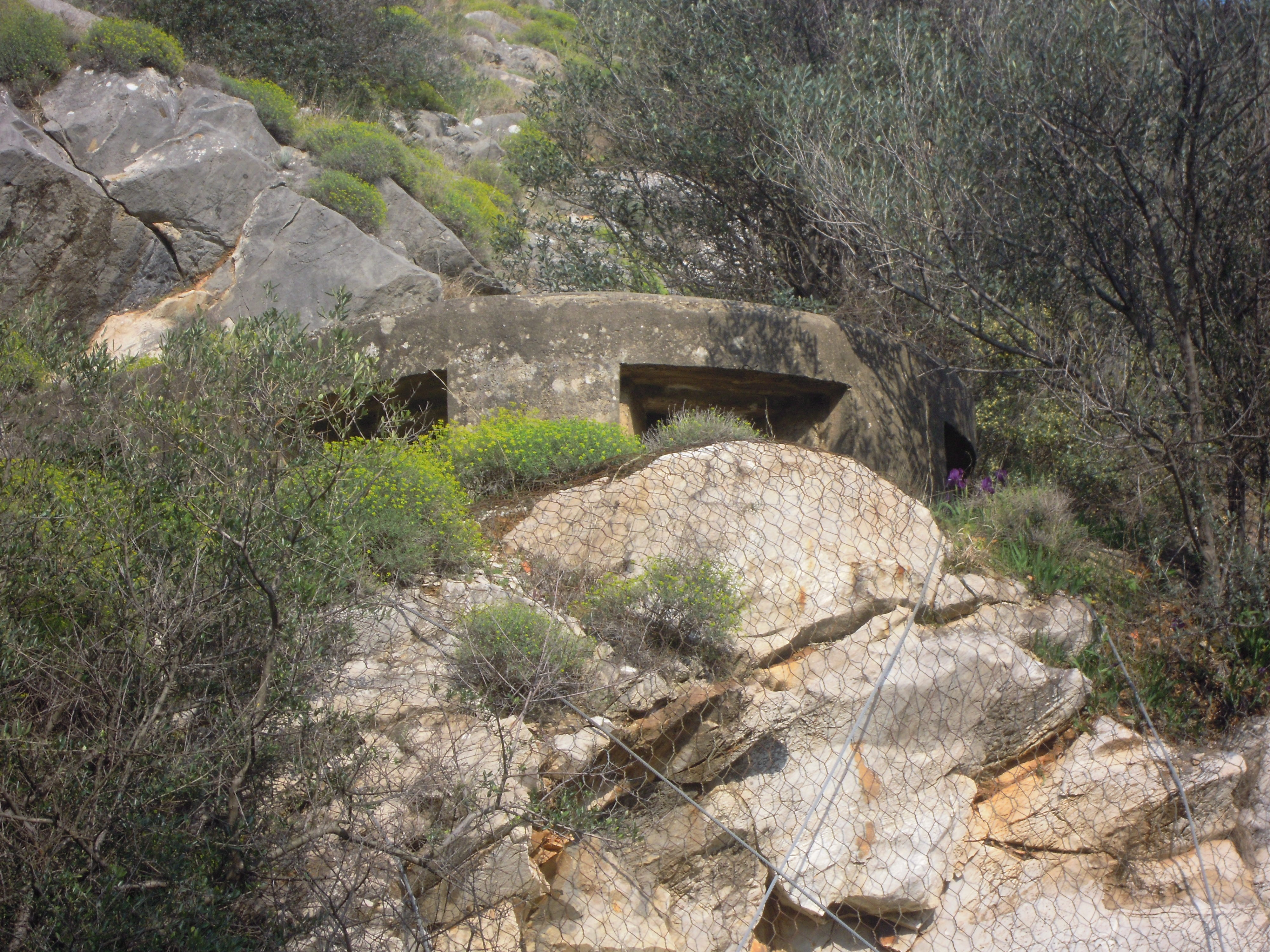 Secondo Bunker Strada Statale 12 tratta Pisa-Lucca